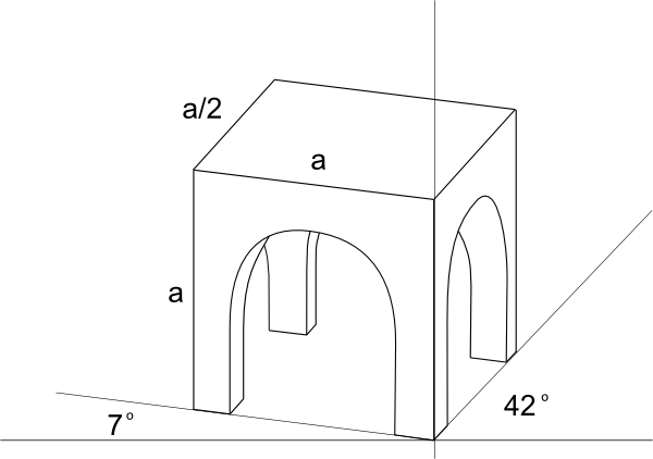 Dimetrisk axiometri. Vinklar 7o och 42o. I djupled används halv skala.